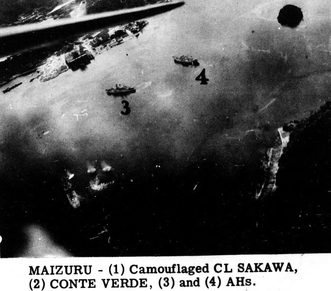 1945年7月、米軍機が撮影した舞鶴空襲時の舞鶴湾